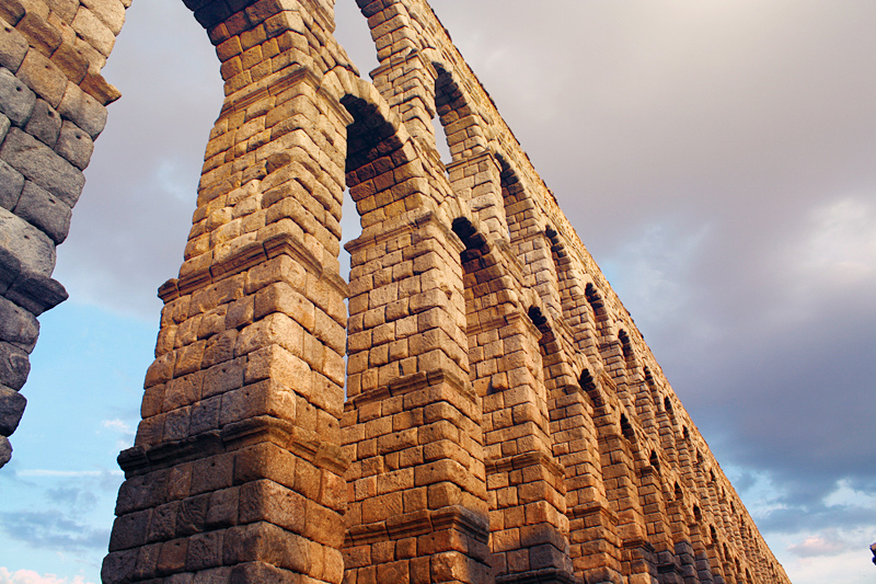 Acueducto